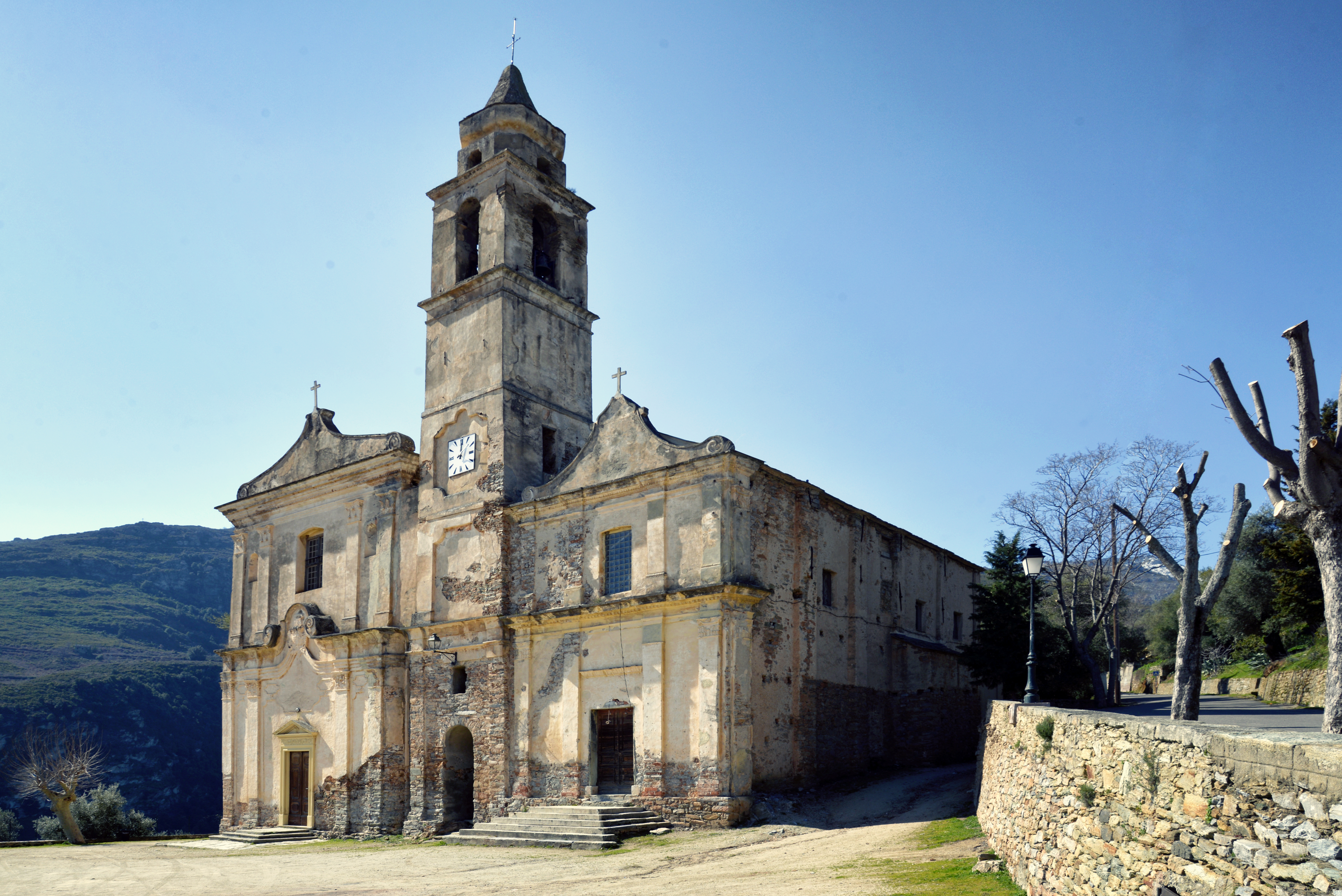 Santo-Pietro-di-Tenda, Nebbio (Corse) - Église paroissiale San Giovanni Evangelista (Saint-Jean)